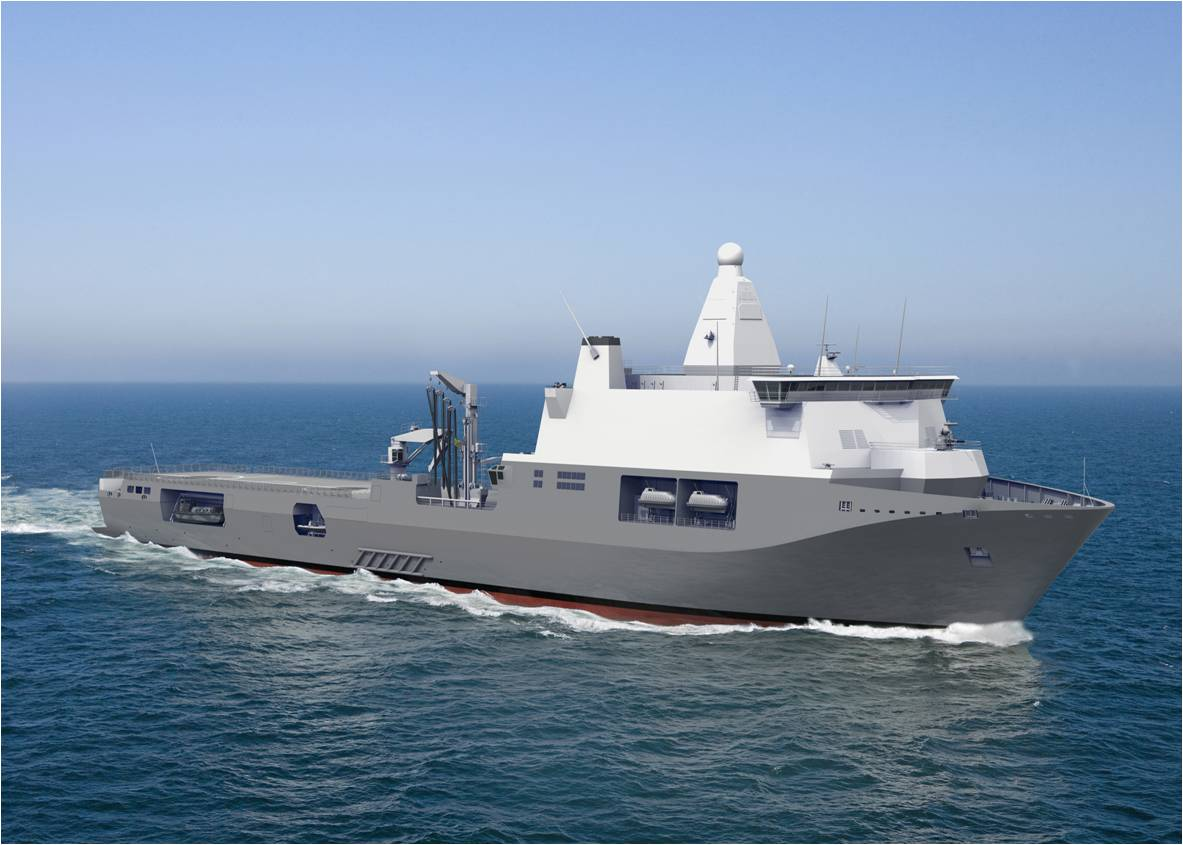 Artist impression of the Joint Logistic Support Ship JLSS Karolius Doorman.